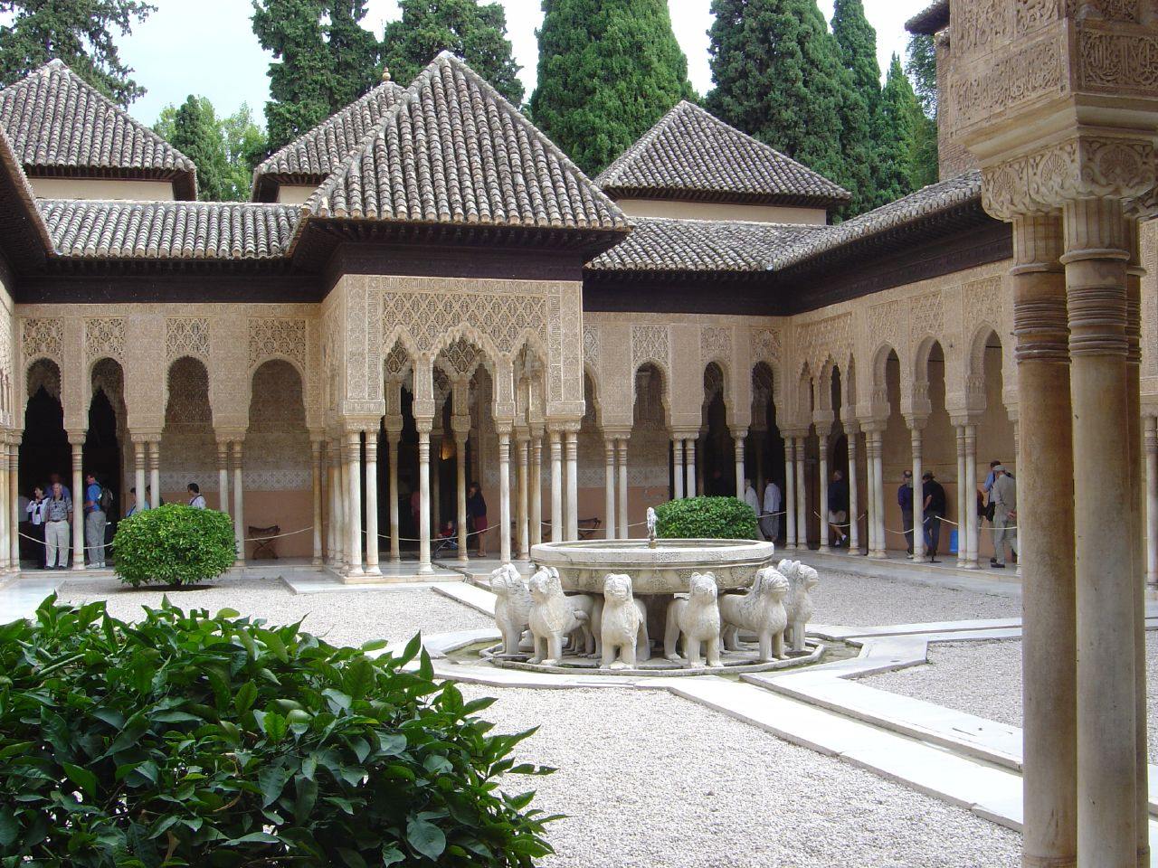 Patio de los leonesGranada - Alhambra y Generalife 047